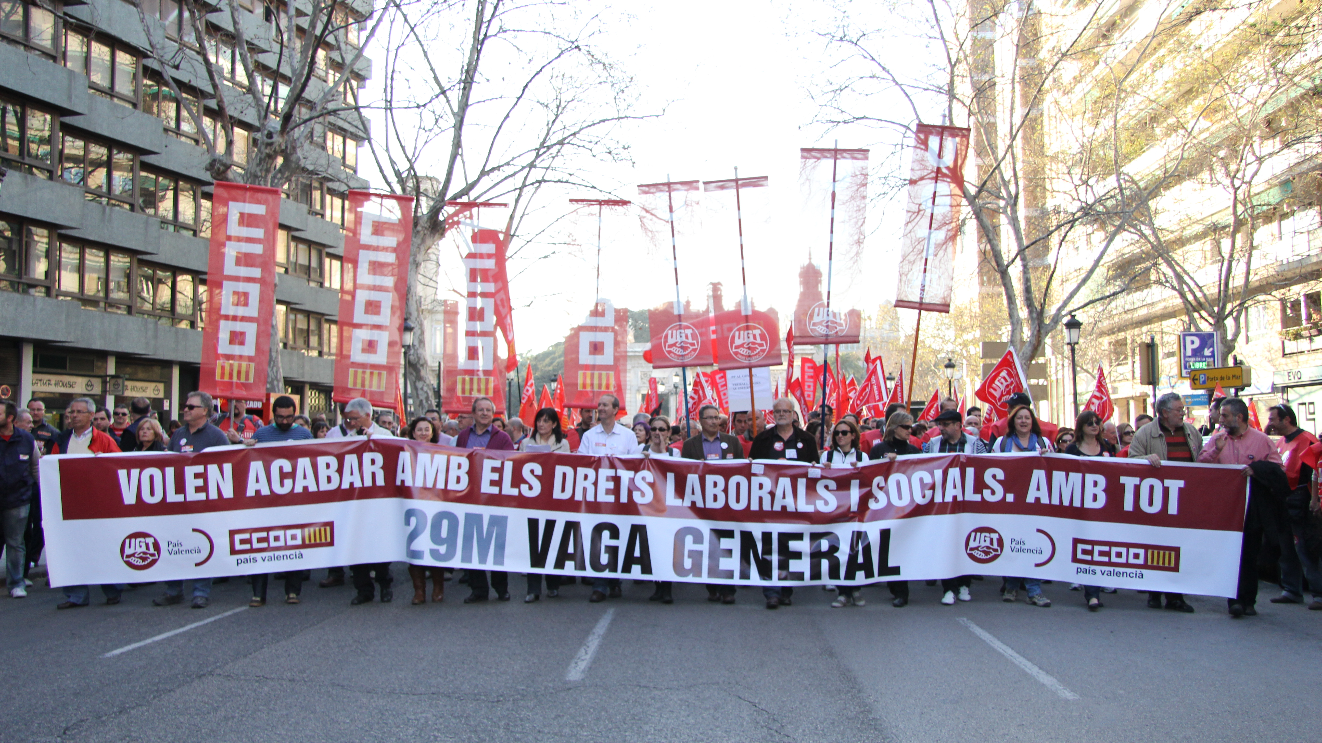 Cabecera de la manifestación convocada por los sindicatos en Valencia el 29M de 2012